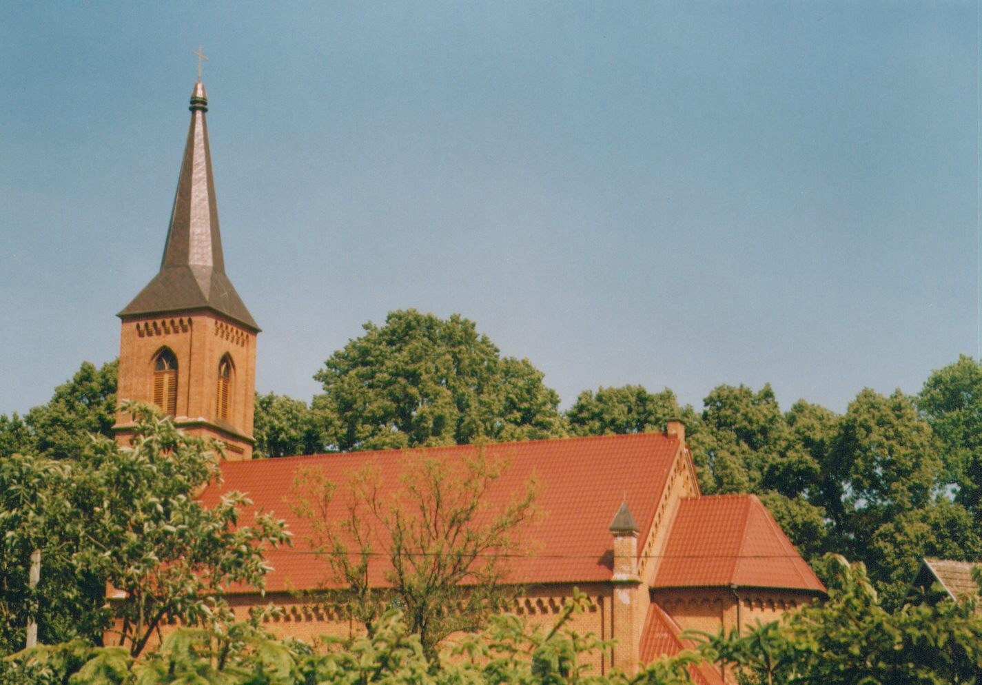 Machowino - kościół filialny p.w. Podwyższenia Krzyża Świętego, 1892 (zabytek nr 1432 z 31.12.1993)